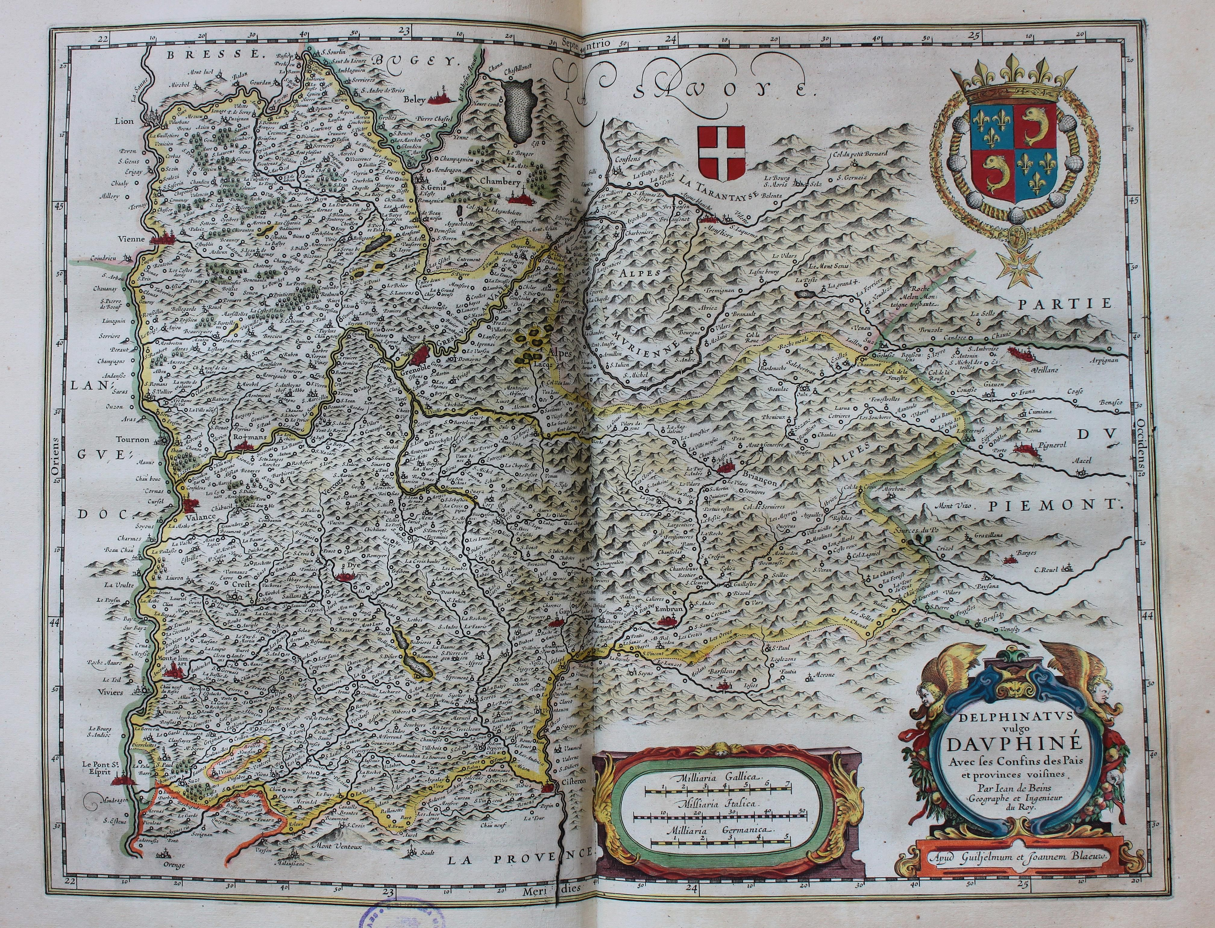 Descripción bibliográfica: Geographia Blaviana. - [Amsterdam : Juan Blaeu, 1659] . - [32], VI, 96 p., 34 f., h. 35a, 35b, 35c, 35d, 36-44 f., 34, [2], 36-40, [2], 43-70 [i. e. 75], [1] f., [20] p. de map., [9] f. de map., [4] f. pleg. de map., [2] f. de plan., [2] f. ge grab. : |bil. ; |cFol. marca major (57 cm.) . - En la dedicatoria a Felipe IV: "Presenta ... El Atlas Universal y Cosmographico de los orbes y terrestre ... Juan Blaeu" . - Título tomado del frontispicio. -- Privilegio fechado en 1659. -Errores de pag. - Sign.: 1, *2, **3, ***-****2, a-e2, A-I2, K1, L-Z2, Aa-Dd2, 4 2, Ee-Ff2, A-I2, K1, L2, M1, N-Y2, Z5, Aa-Dd2, Ee1, A-D2, E-F1, G-I2, K-L1, M-O2, P1, Q-Z2, Aa-Bb2, Cc1, Dd3, Ff-Zz2, Aaa-Bbb2, . - Frontispicio grab. col. -- Incluye un total de 49 il. entre map., plan. i grab. Materia: Atlas - Obras anteriores a 1800 Impresor: Blaeu, Joan, 1596-1673, imp. Lugar de impresión: Holanda. Amsterdam Localización: Vea la ilustración en su contexto Visite también la exposición "Cartografía histórica en la Biblioteca de la Universidad de Sevilla"